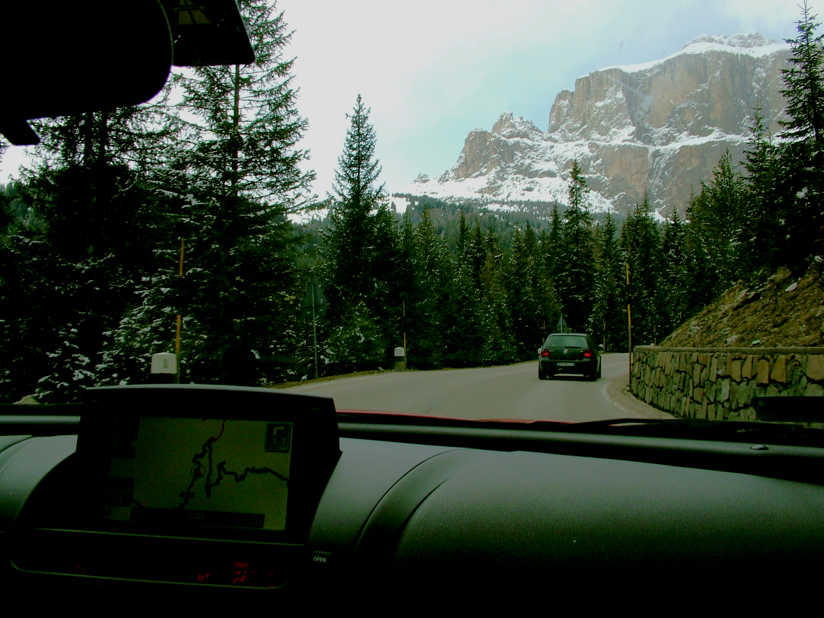 Út a Pordoi-hágóra (olasz Alpok), Val di Fassa